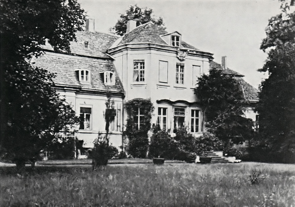 Castle Reckahn, Brandenburg (Germany)